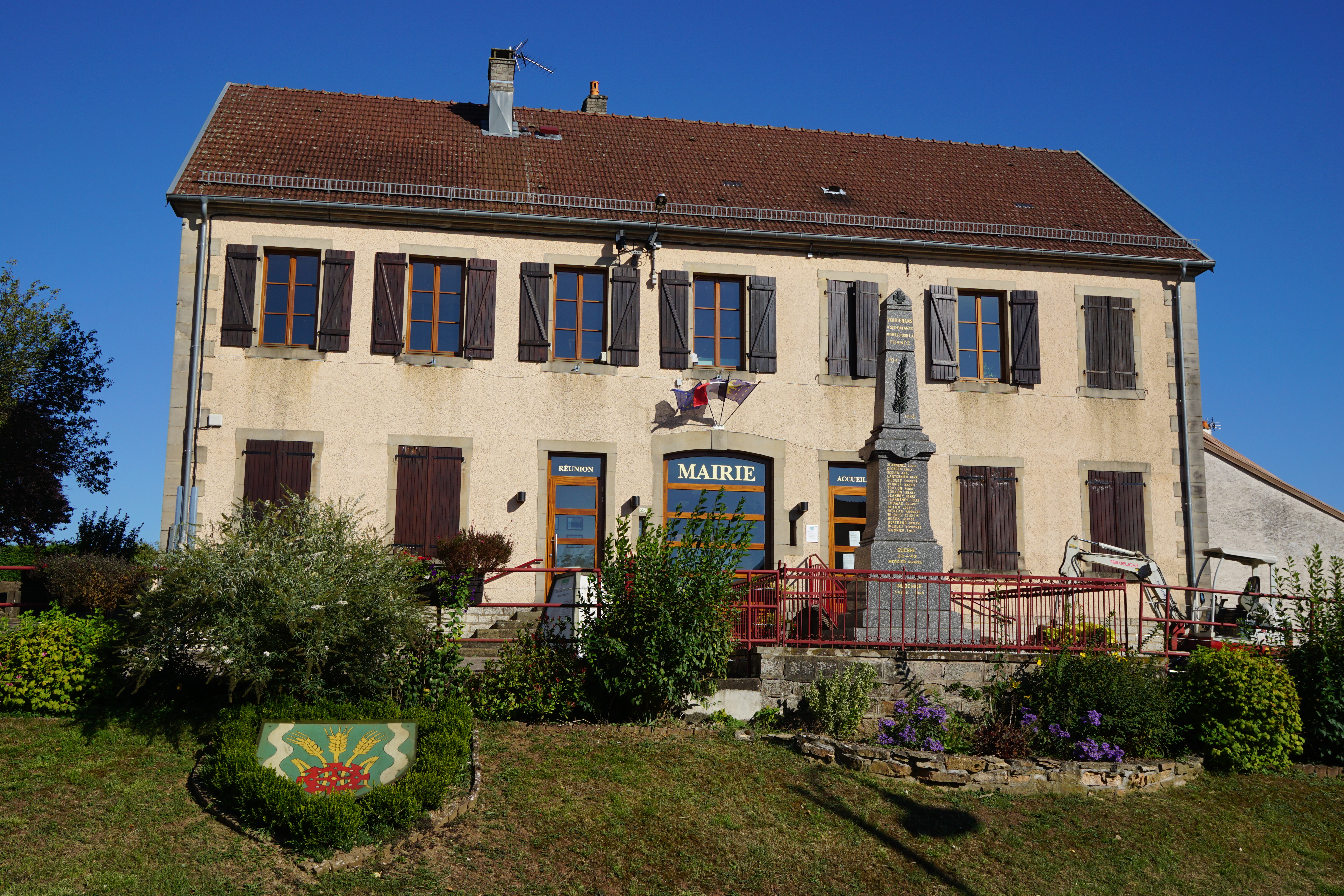 Mairie de Vouhenans 70.